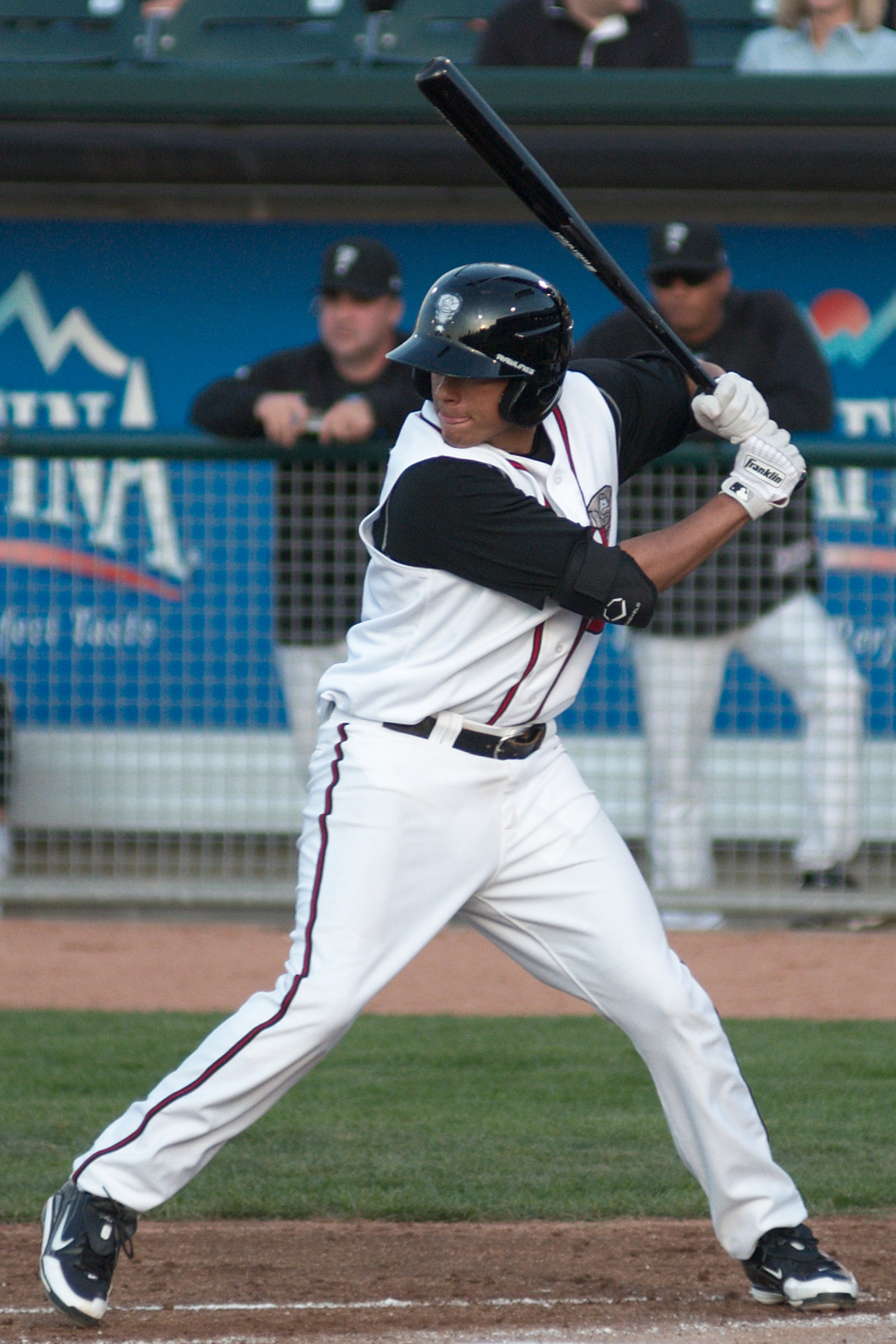 Ryan Goins